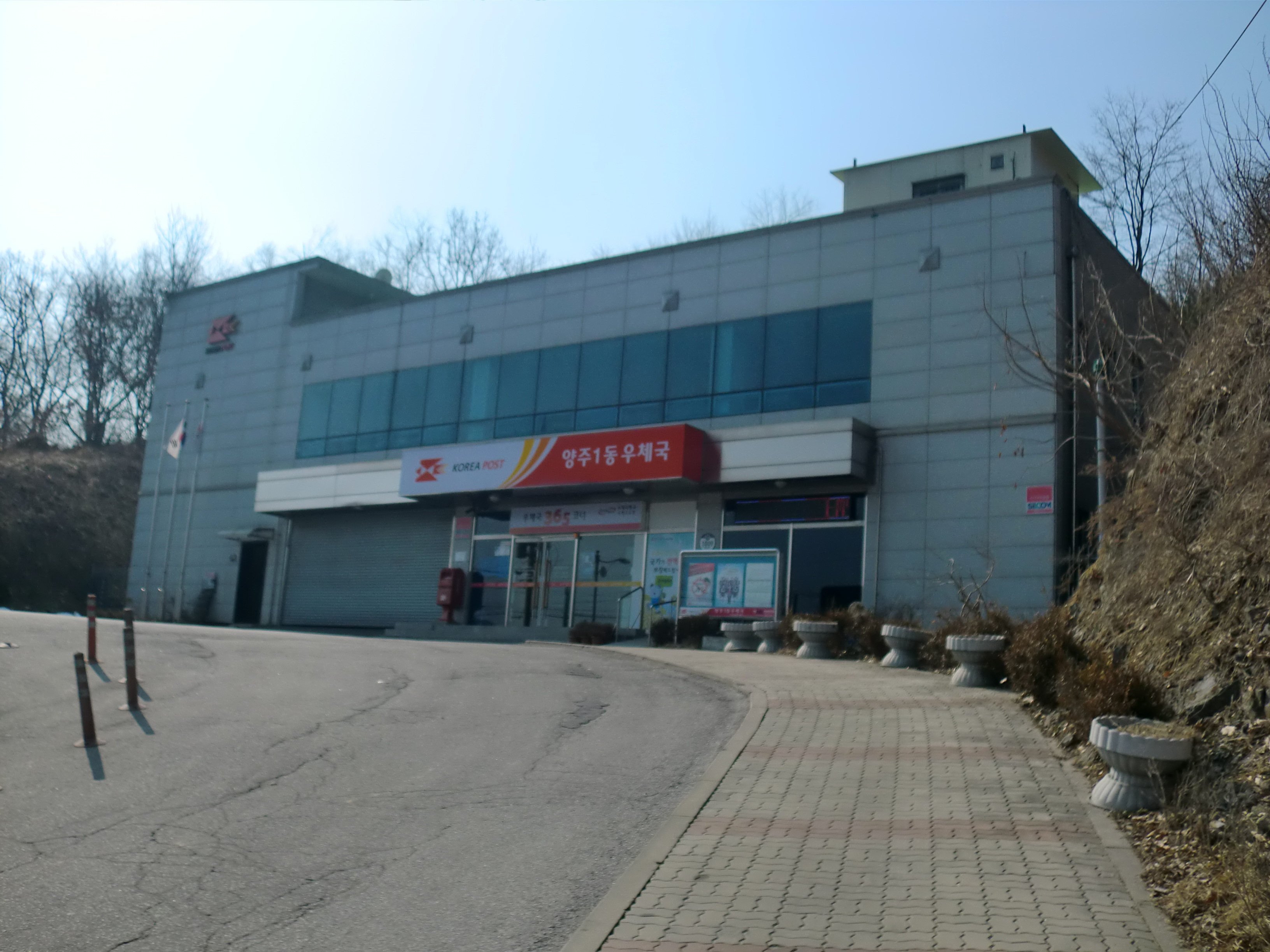 경기도 양주시에 있는 양주1동우체국